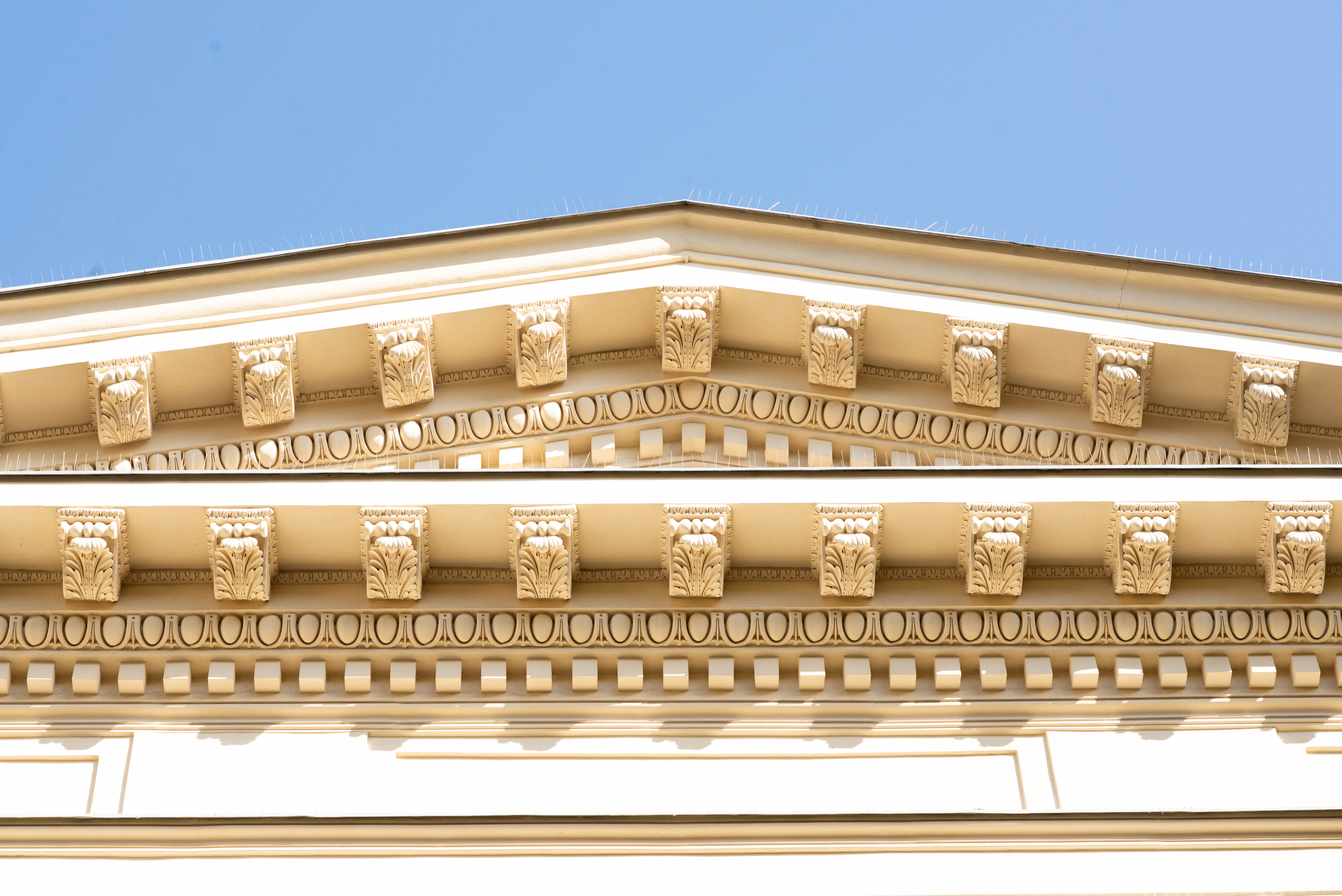 Fassadendetail der Synagoge zum Weißen Storch